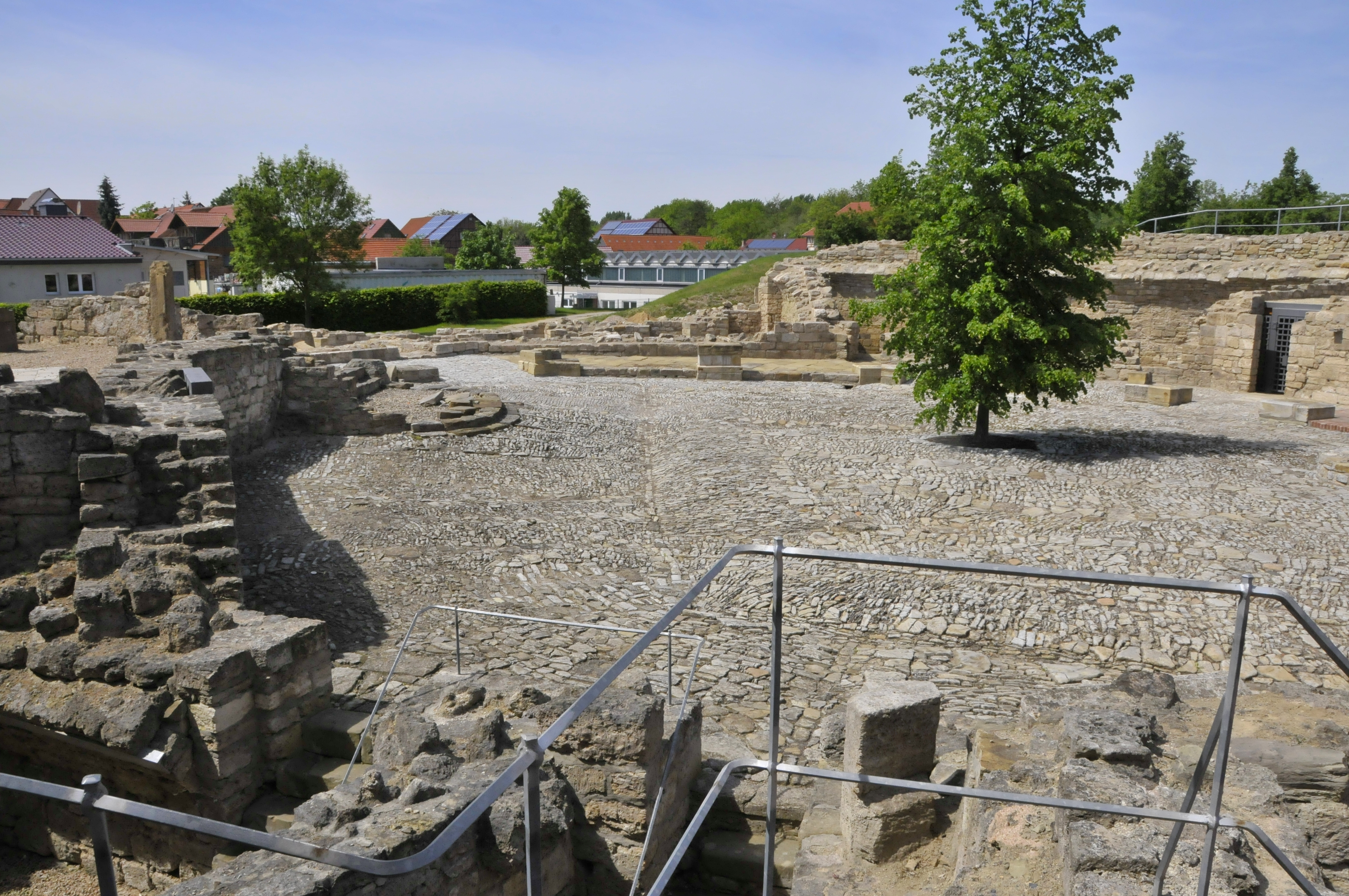 Schlossruine Herbsleben